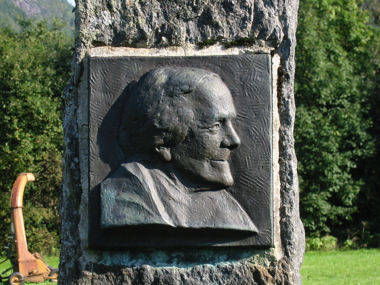 Relieff av Nikka Vonen